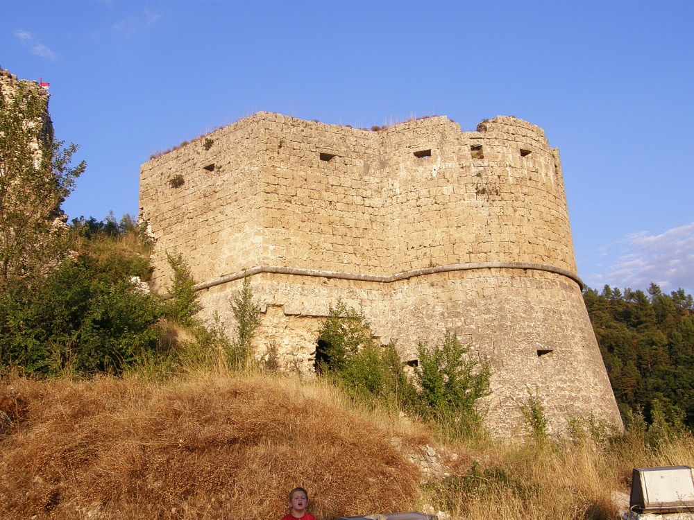 Popoli